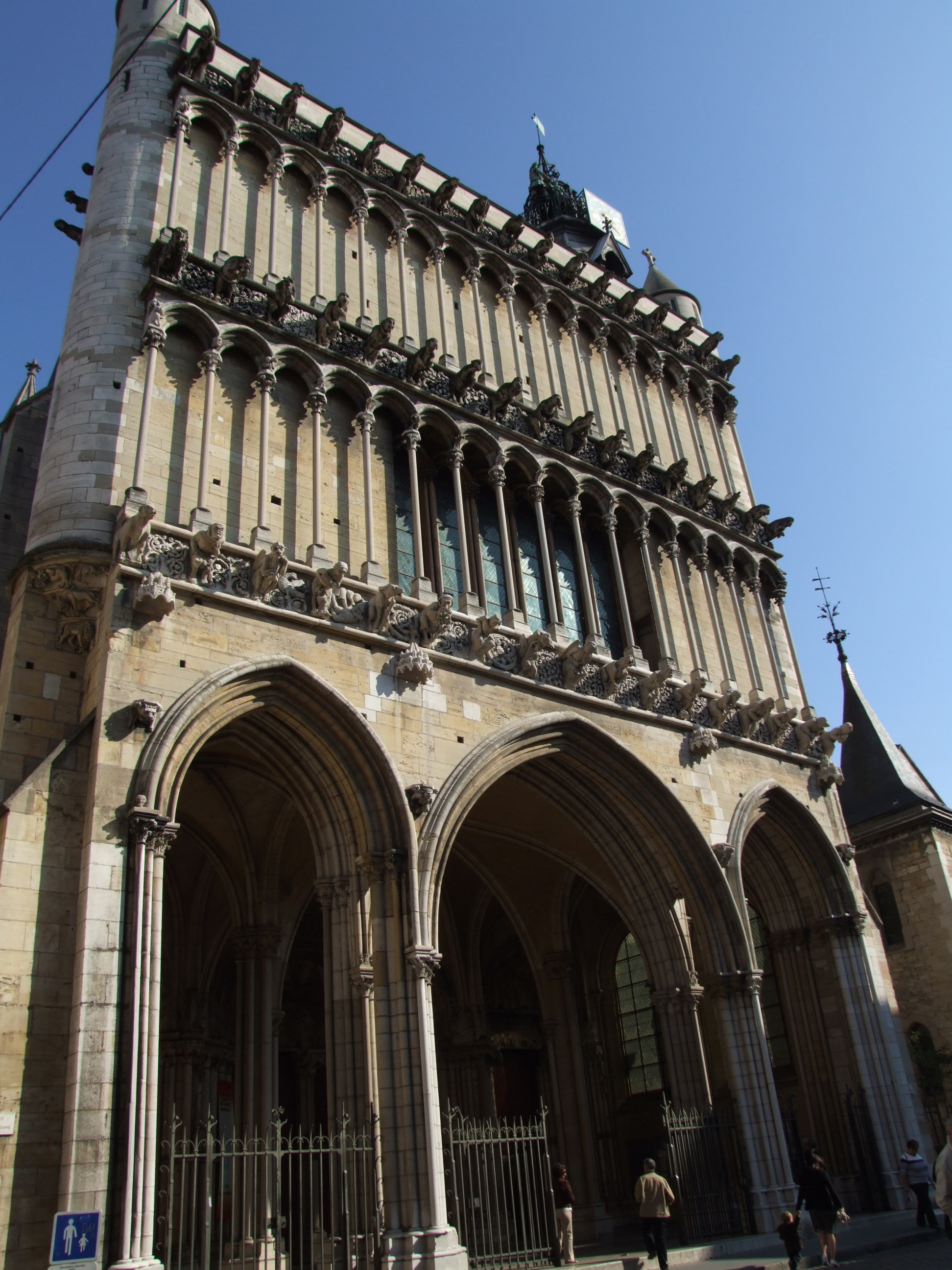 Église Notre-Dame de Dijon, Dijon, Côte-d'Or, Bourgogne, FRANCE